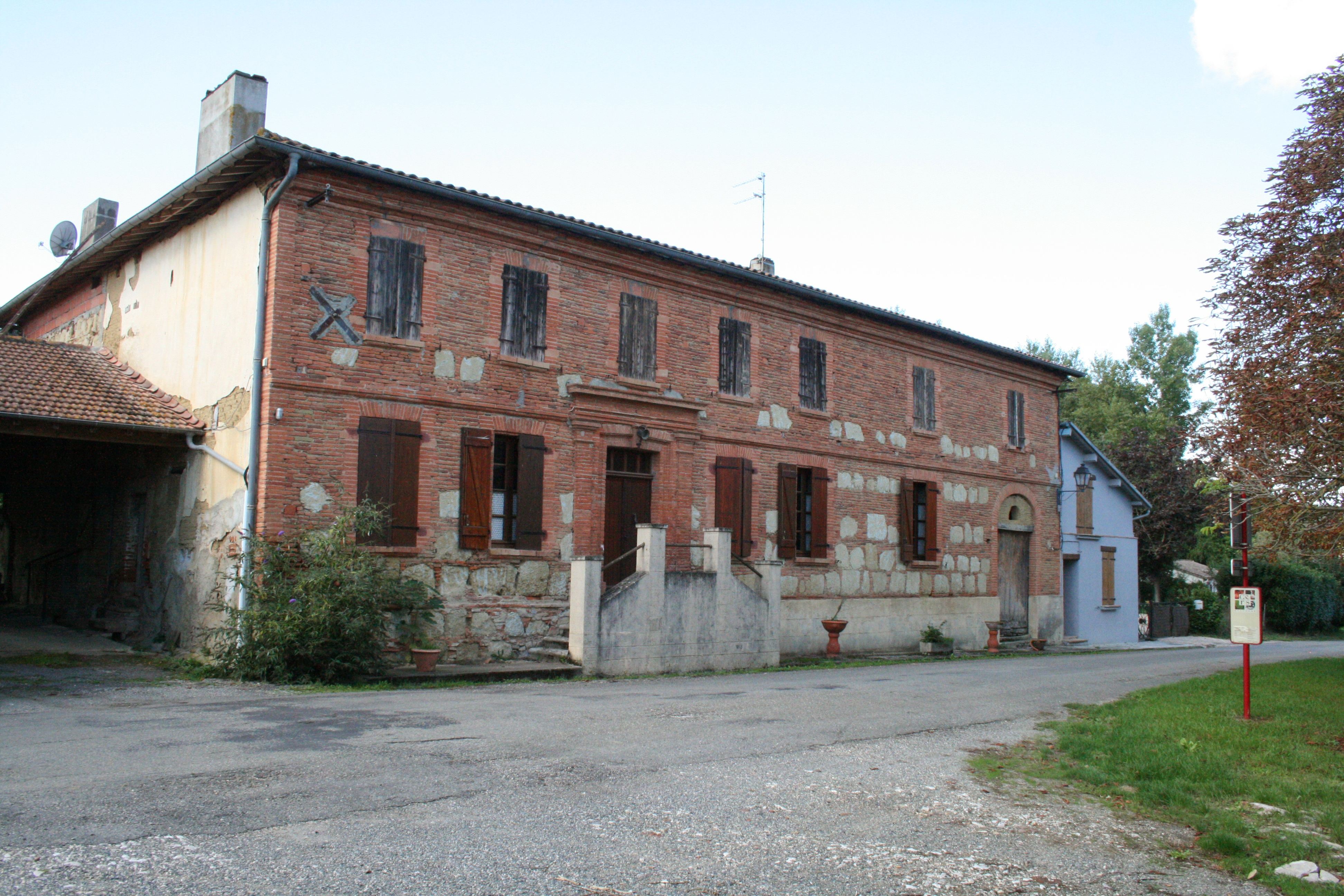 Maison de la commune de Pébées, dans le Gers